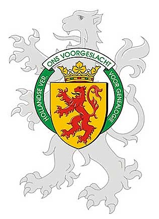 Het logo van de Hollandse Vereniging voor Genealogie, met het wapen van Holland, een rode leeuw op goud